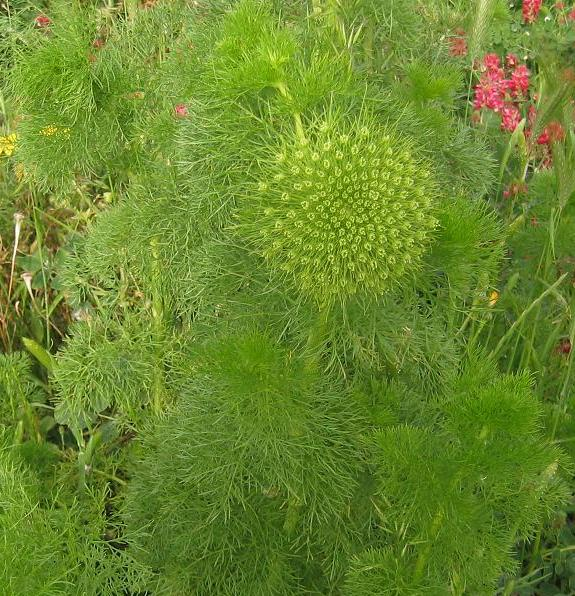 Ammi crinitum (Apiaceae)